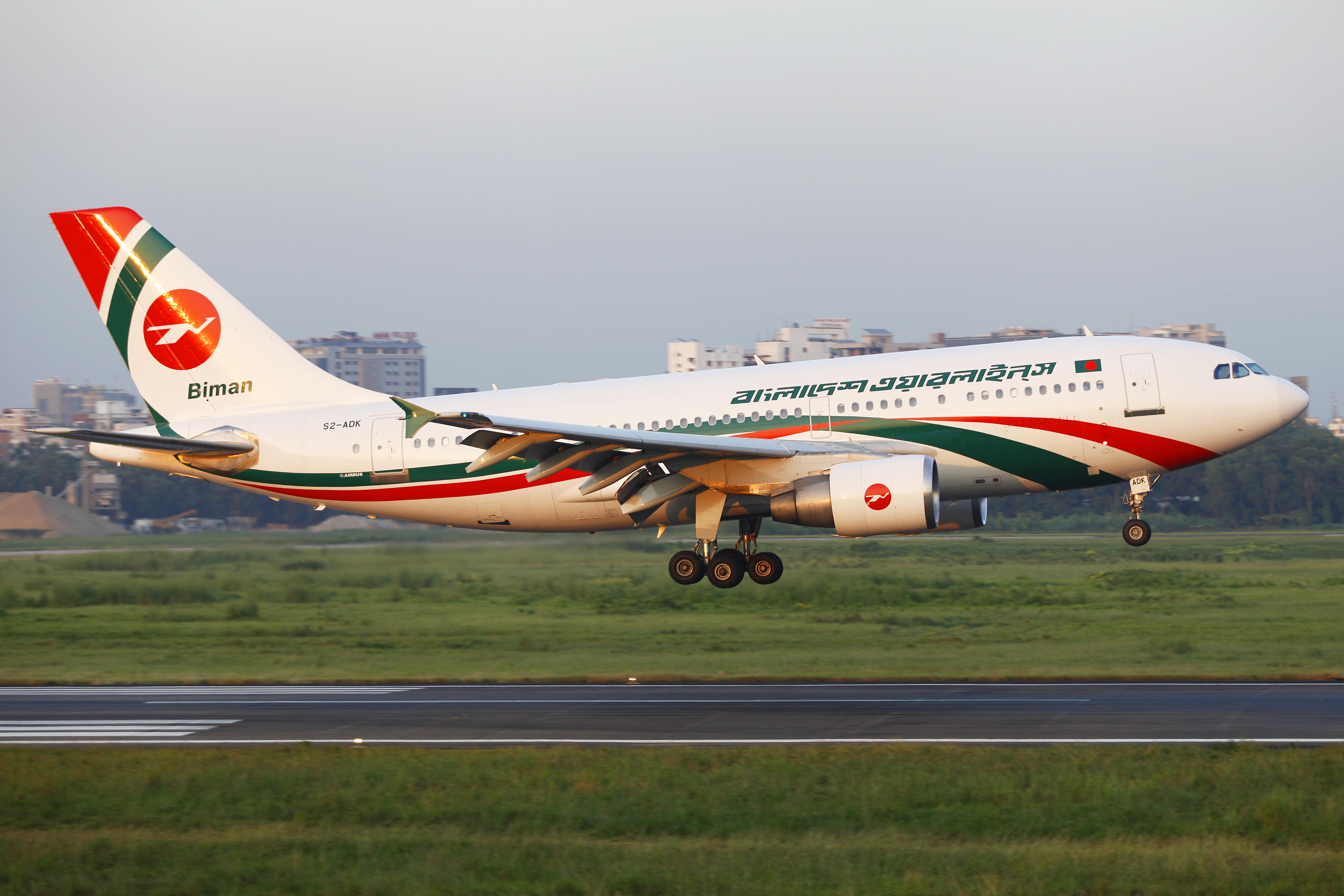 S2-ADK Airbus A310-324 Biman Bangladesh Airlines Landing at Hazrat Shahjalal International Airport Dhaka - VGHS / DAC